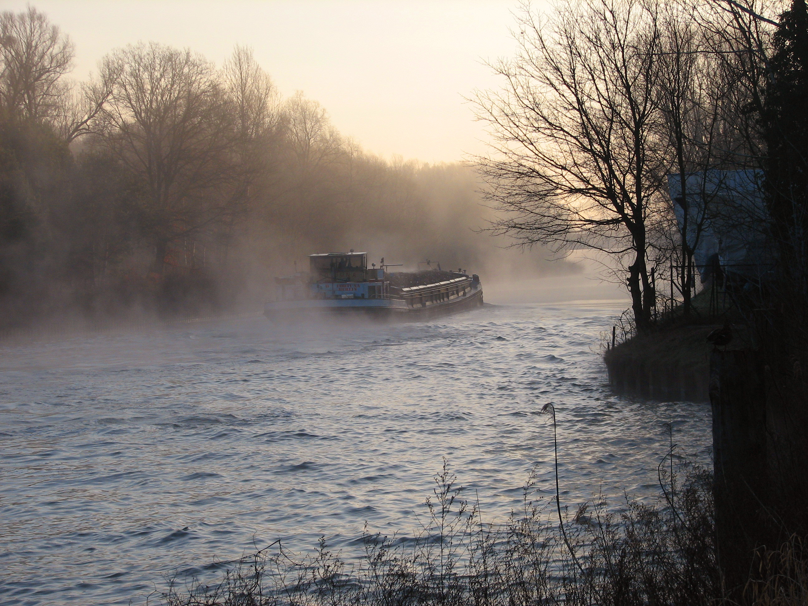 Schiffsverkehr auf dem Teltowkanal zwischen Dreilinden und Albrechts Teerofen